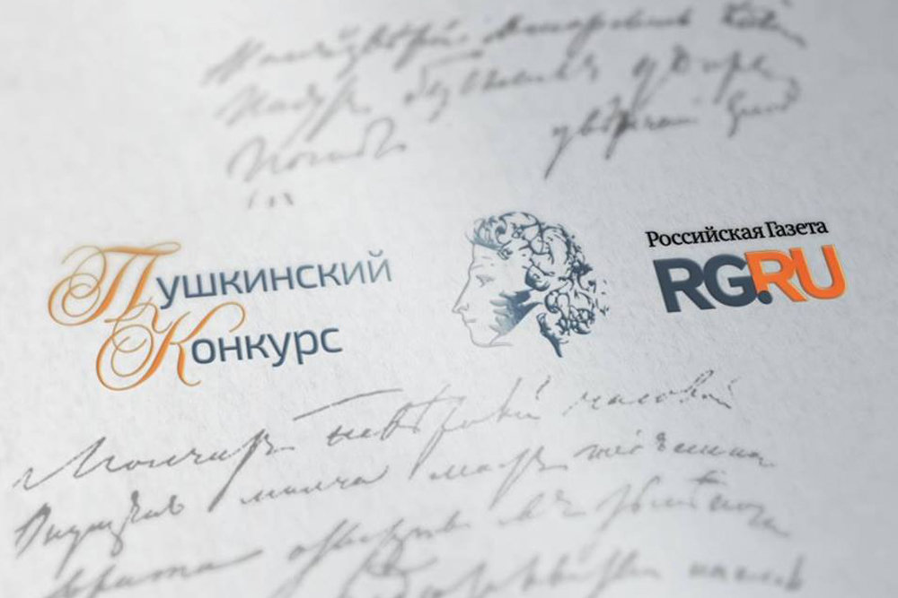 Международный Пушкинский конкурс — конкурс для педагогов-русистов из ближнего и дальнего зарубежья